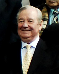 El presentador de televisión español Ramón Sánchez Ocaña